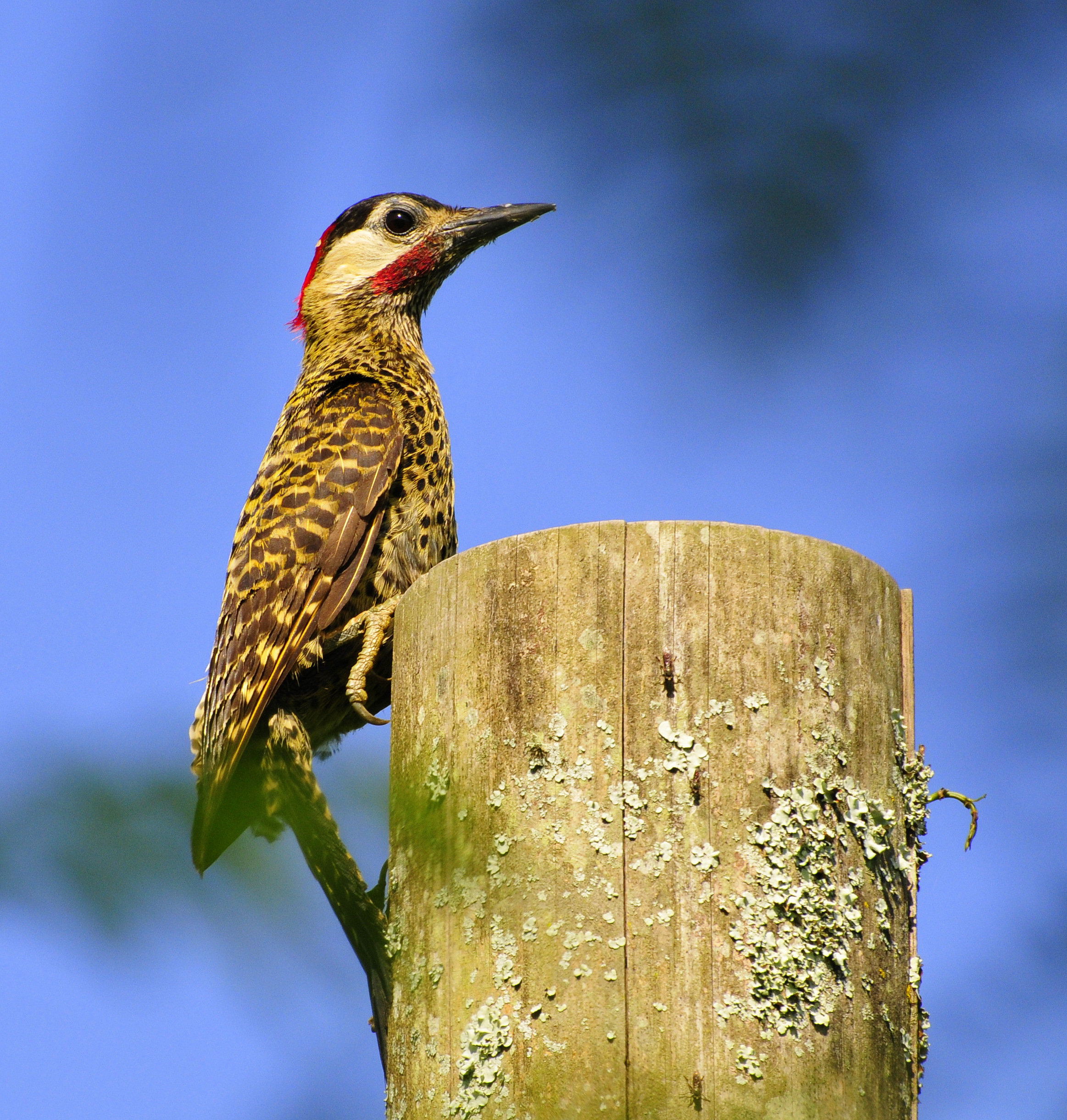 Lanchonete OASYS - Margem do rio Ribeira de Iguape - Registro-SP - Brasil